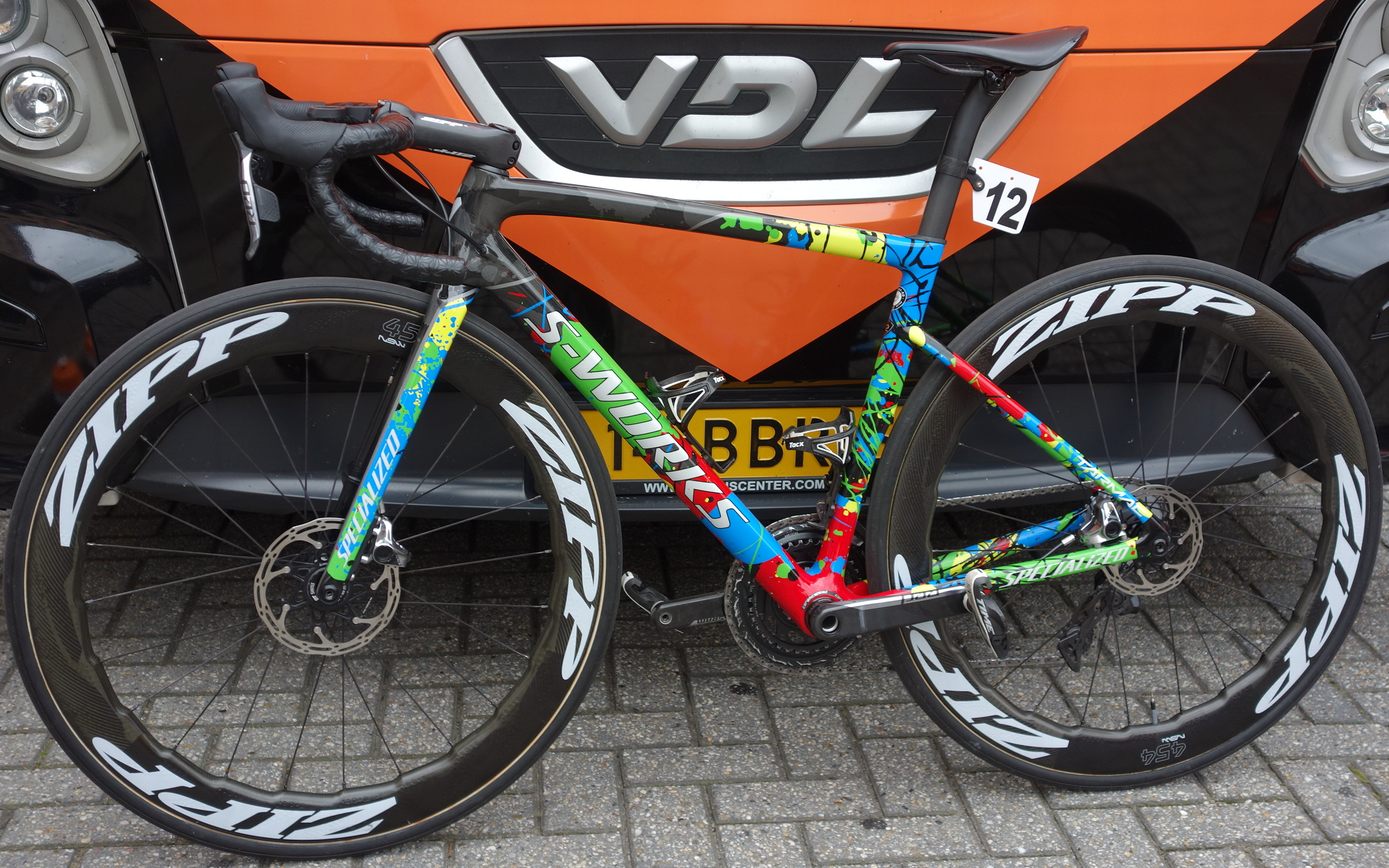 Fiets van wereldkampioene Anna van der Breggen (Boels Dolmans) bij de finish van de eerste etappe van Stramproy naar Weert in de Boels Ladies Tour 2019